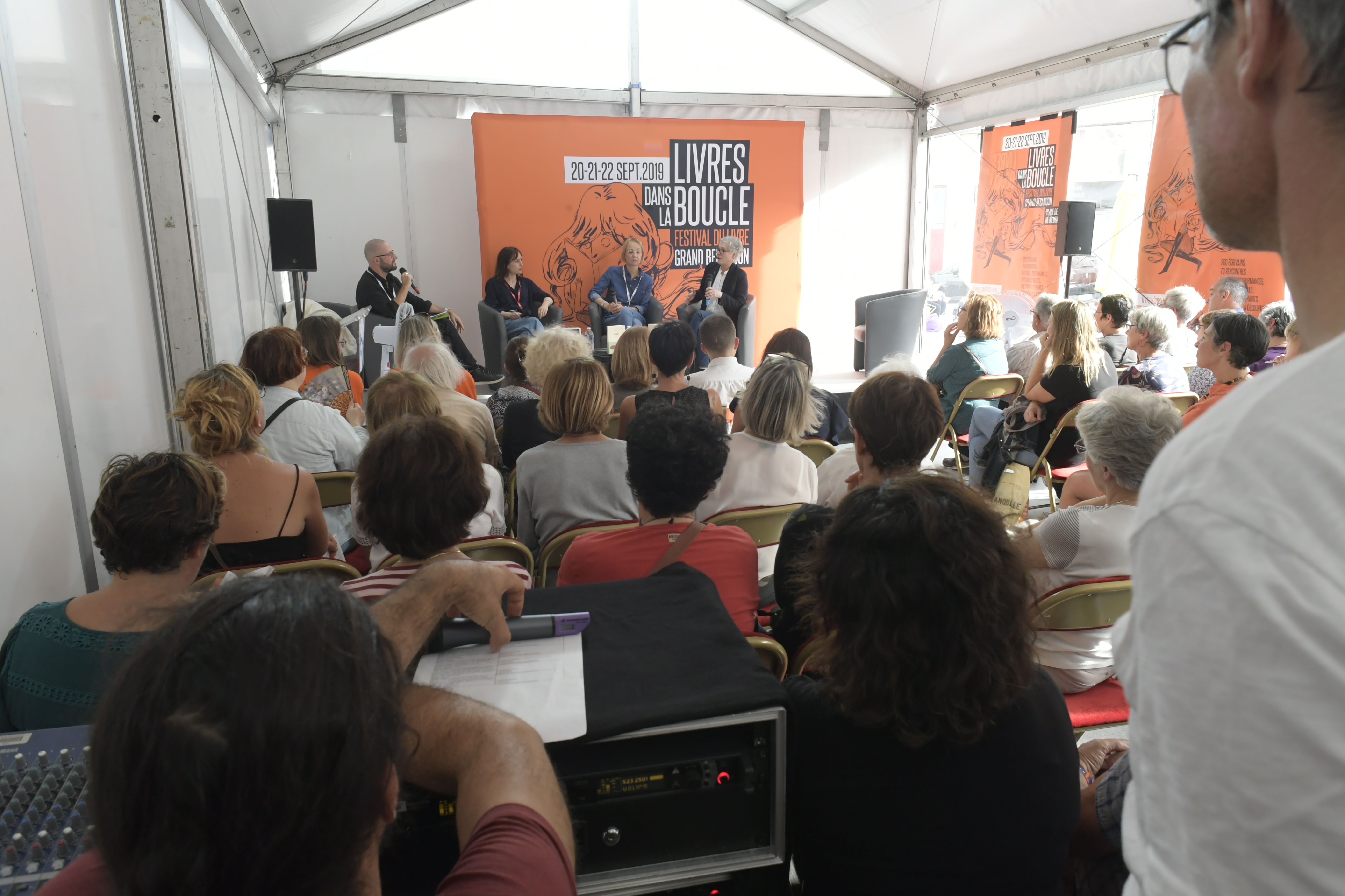 L'un des nombreux cafés littéraires lors de l'édition 2019 de Livres dans la Boucle